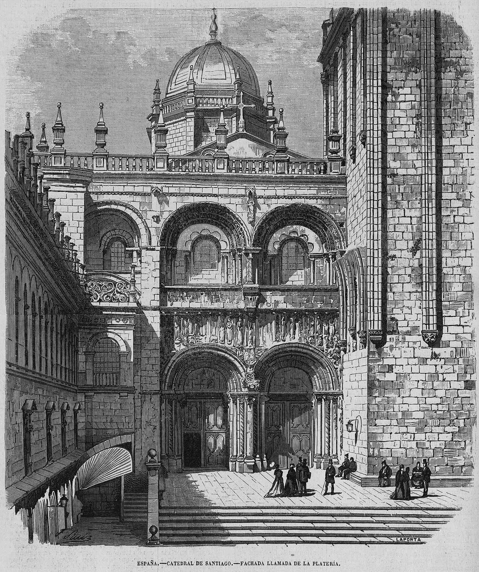 Catedral de Santiago, fachada llamada de la Platería, en la revista española El Museo Universal.